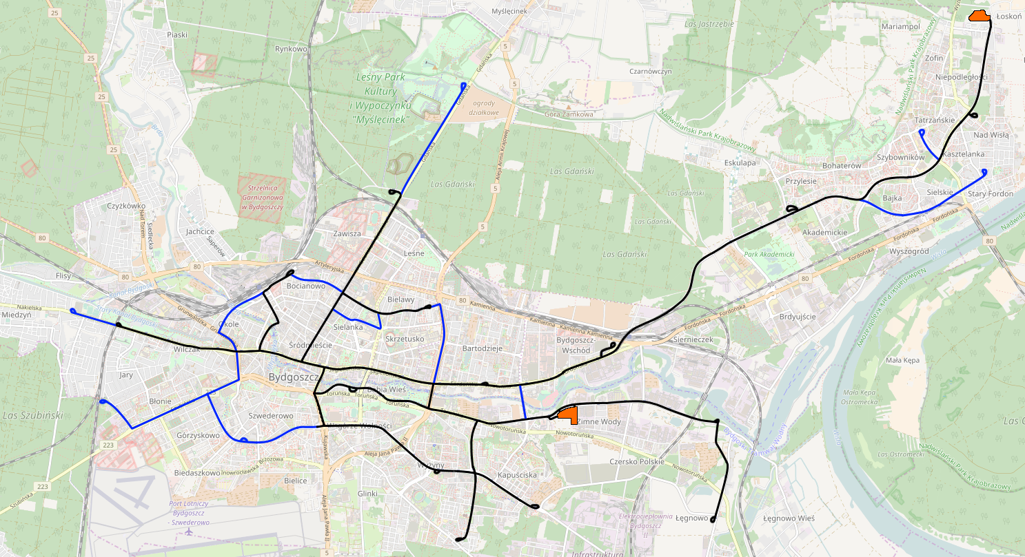 Sieć tramwajowa w Bydgoszczy, linie istniejące i planowane.